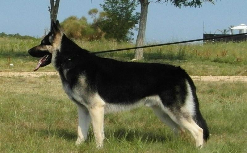 Monsher Virsal Uorren - Osteuropäischer Schäferhund